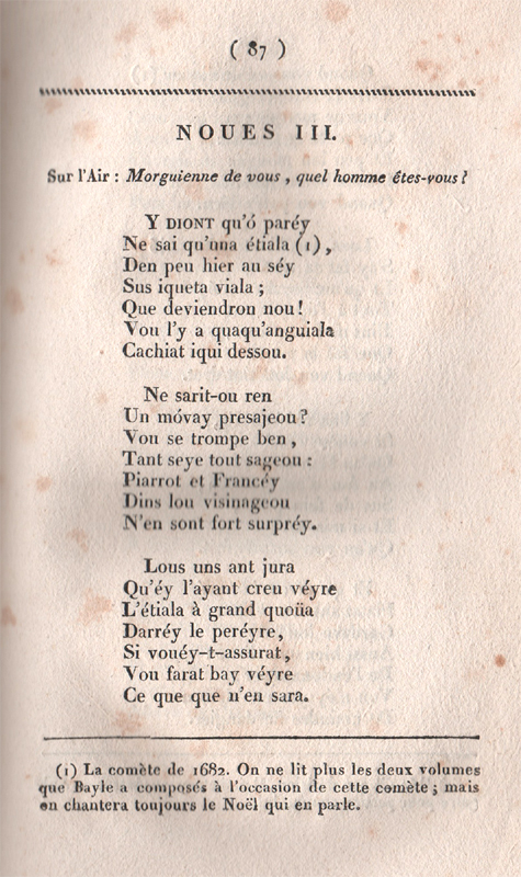 "Noues III," poem in Franco-Provençal language by Jean Chapelon.